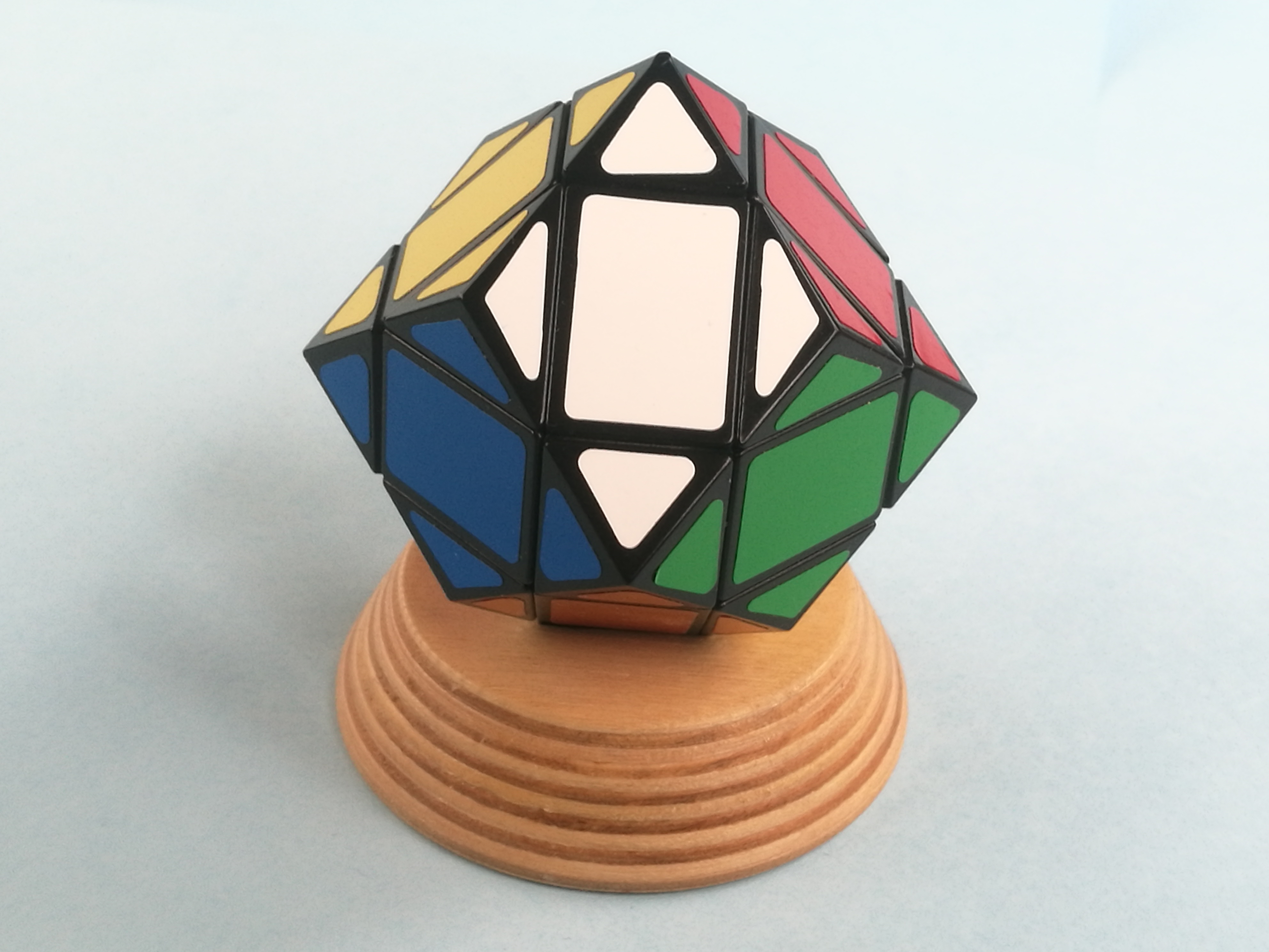 Kis gránát - háromtengelyes Rubik-kocka szerű játék